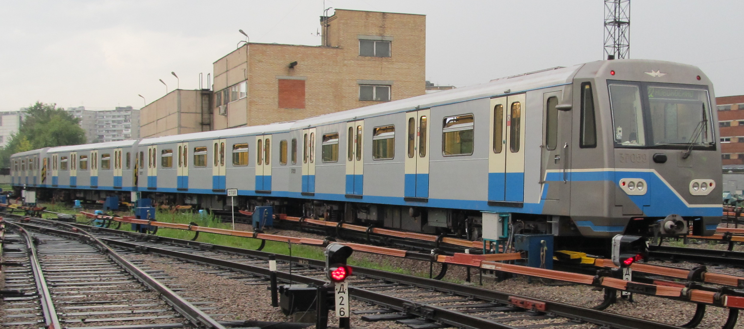 Электропоезд 81-760/761 на территории электродепо "Новогиреево"